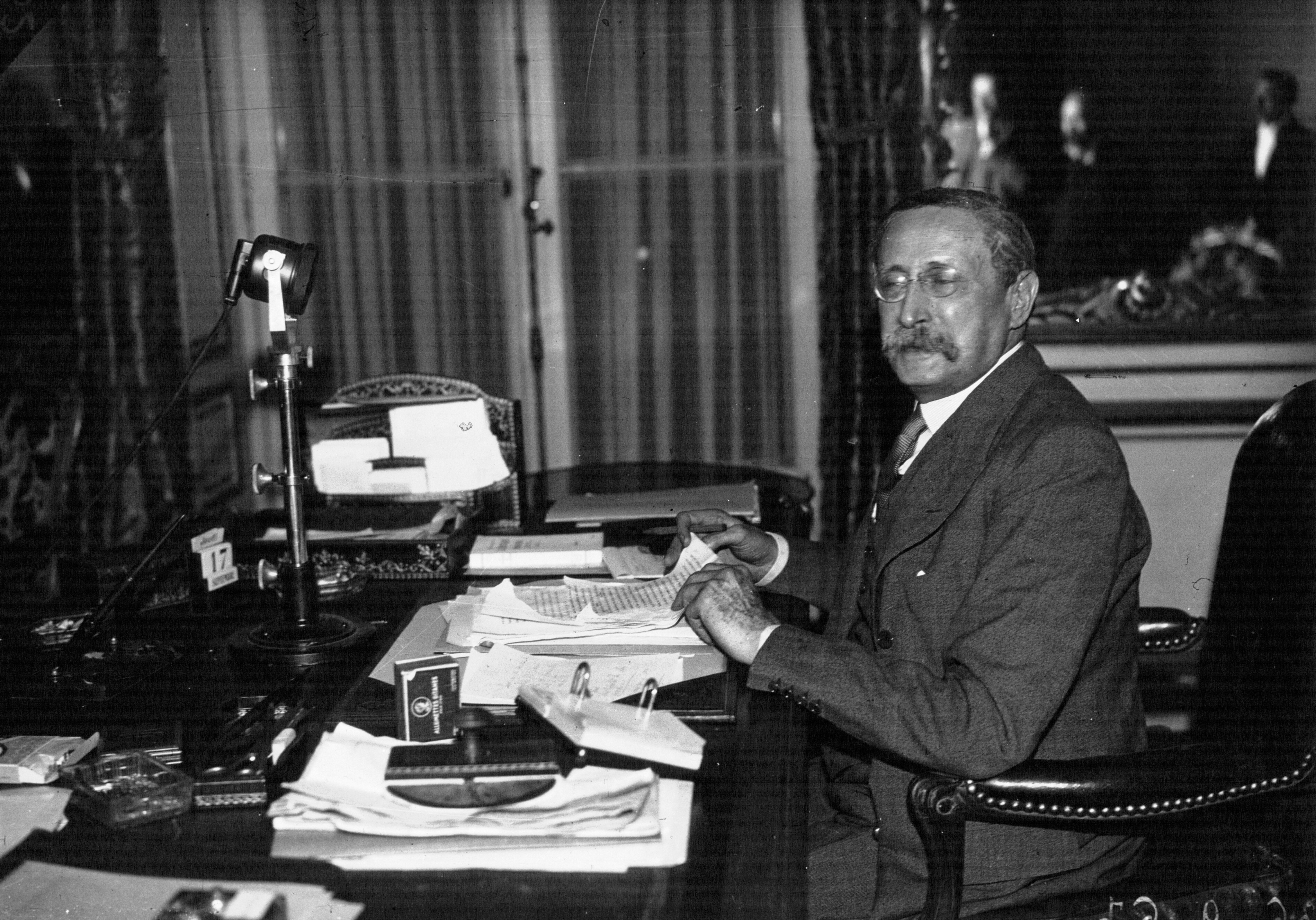 Léon Blum au micro, 1936.